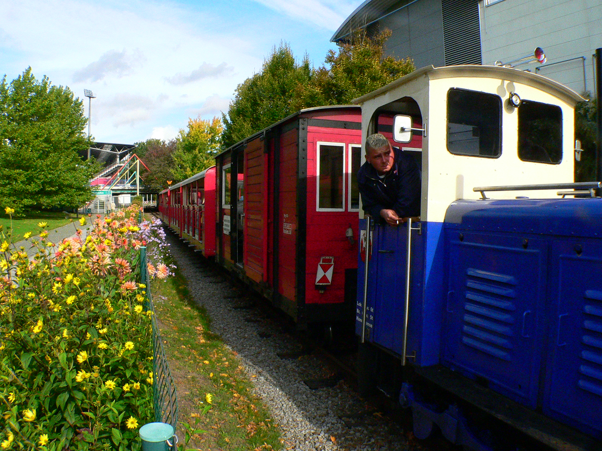 Cottbuser Parkbahn im Speeauenpark. Rechts: Messehalle, im Hintergrund Energie-Stadion